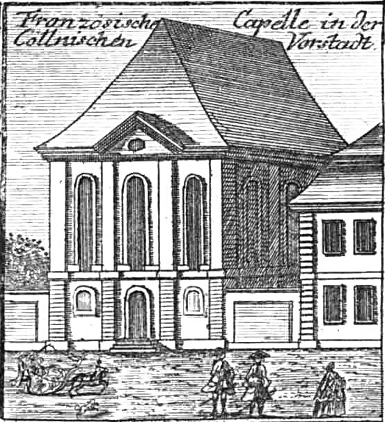 Aus Schleuens Berliner Plan von 1757 entnommen